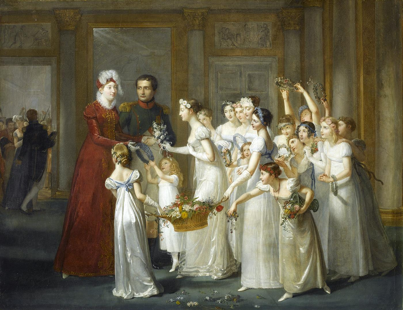 Arrivée de l'impératrice Marie-Louise à Compiègne le 28 mars 1810 (Marie-Louise recevant les compliments et les fleurs d'un groupe de jeunes filles dans la Galerie du chartrain à Compiègne à 9h du soir)